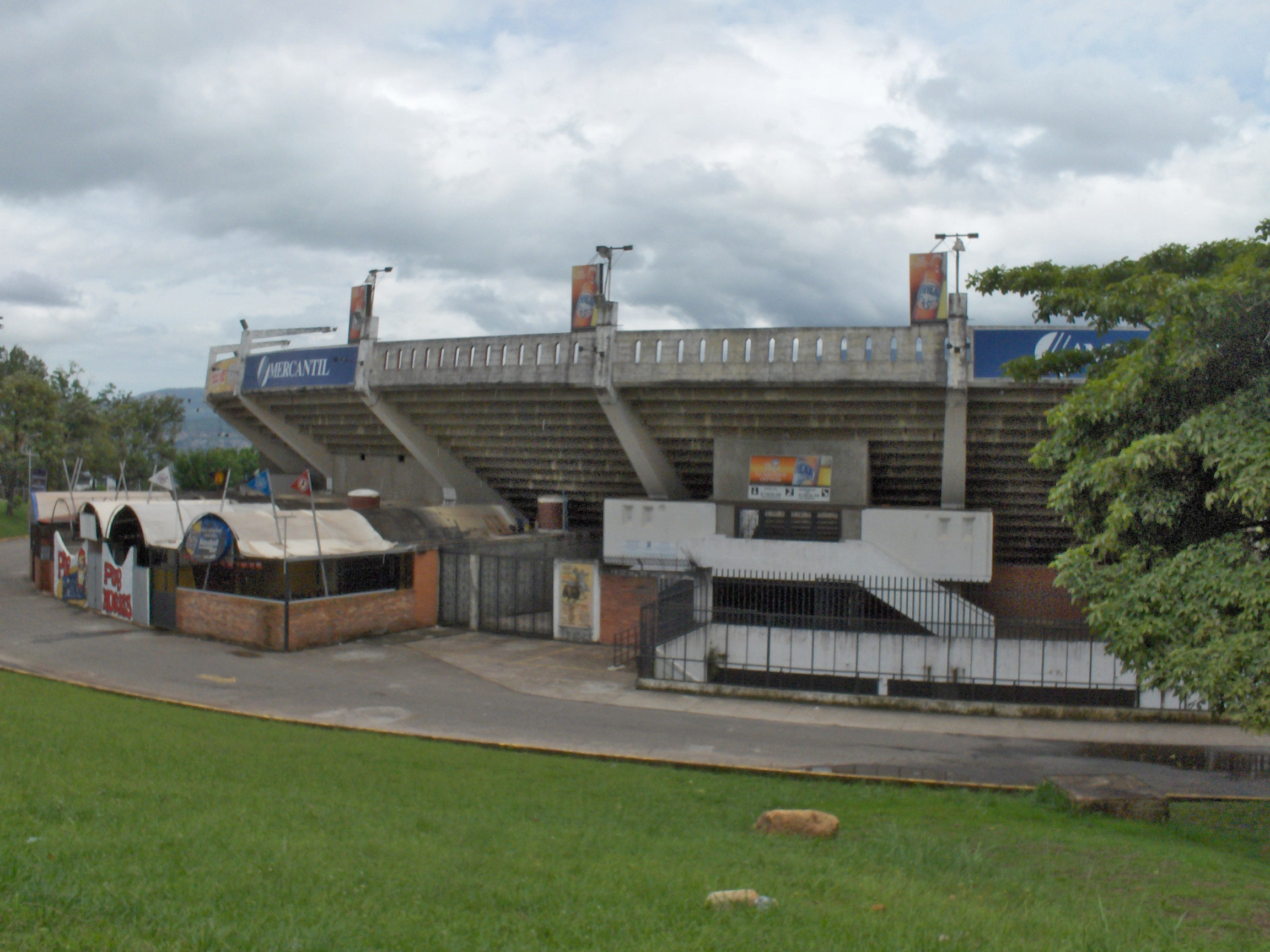 Plaza de Toros de Pueblo Nuevo, San Cristóbal, estado Táchira.